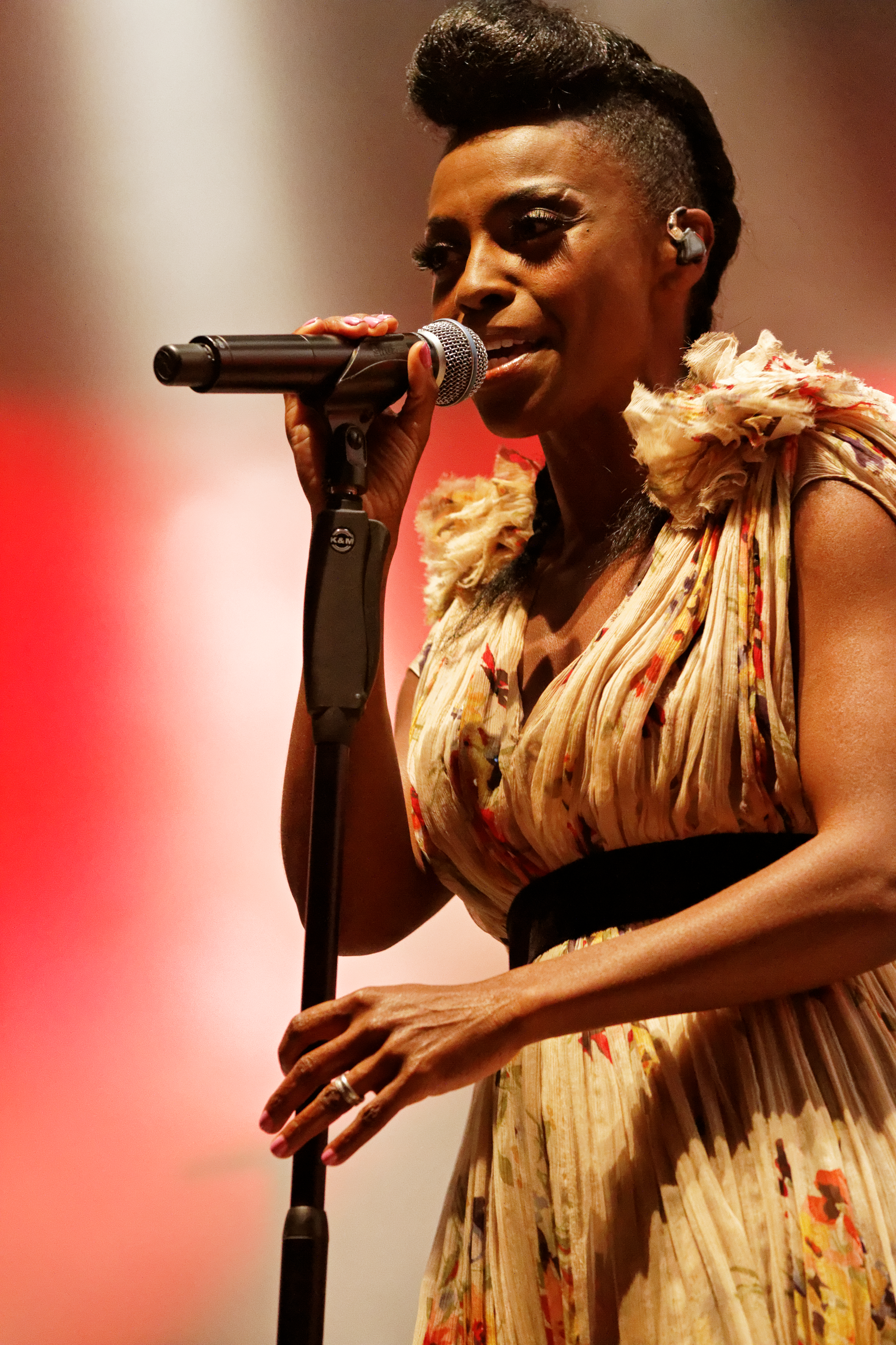 Morcheeba en concert sur la scène Landaoudec lors du festival du bout du Monde à Crozon dans le Finistère (France).